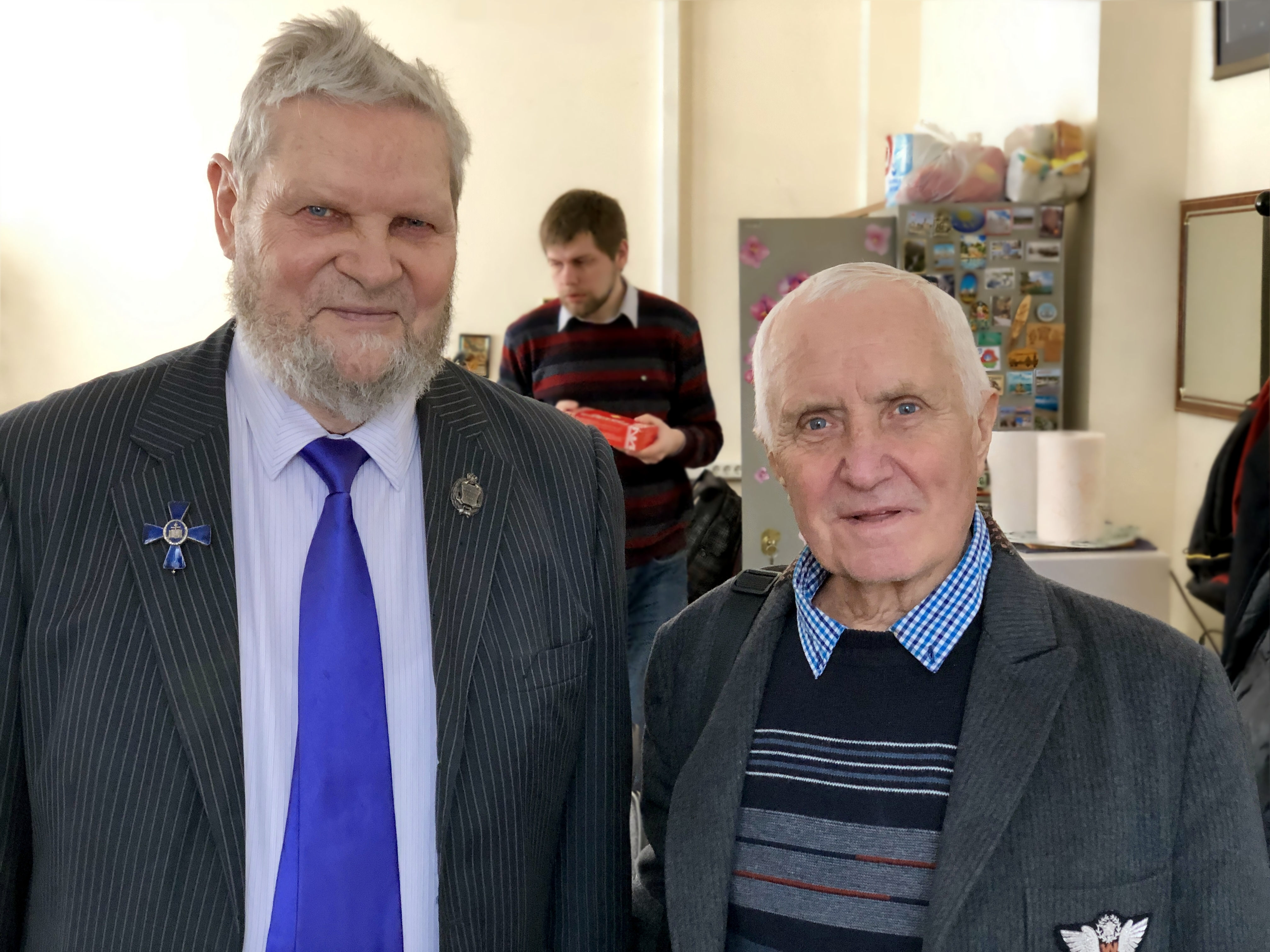 Историки наук о Земле, юбиляры, А.В. Постников и В.И. Оноприенко на заседании Секции истории наук о Земле XXV Годичной научной конференции ИИЕТ РАН, Москва, 28 марта 2019 г.